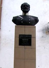 Паметник на капитан Николай Алексеевич Киреев, роден през 1841 г., загинал край Белград на 6 юли 1876 г. в Сръбско-турската война. Намира се пред читалището в село Киреево, наименувано на героя.